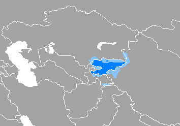 Idioma kirguísː Donde es mayoritario Donde es minoritario